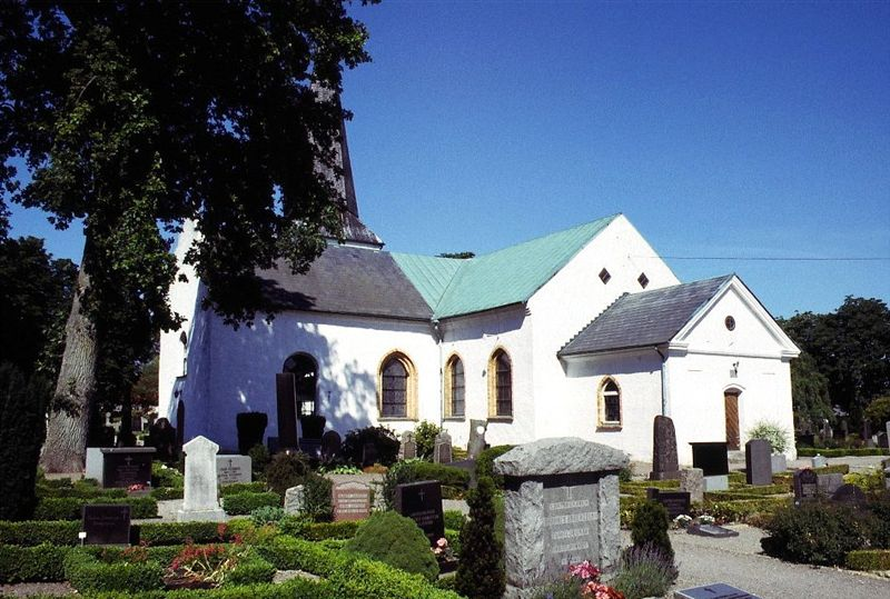 Väsby kyrka i Skåne, Sverige. Väsby kirke